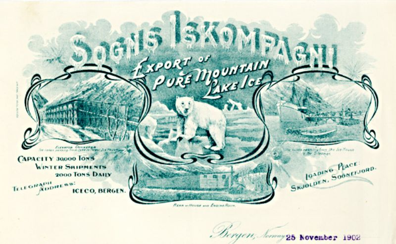 Påkosta brevhovud frå Sogn Iskompagni i Skjolden(1902).